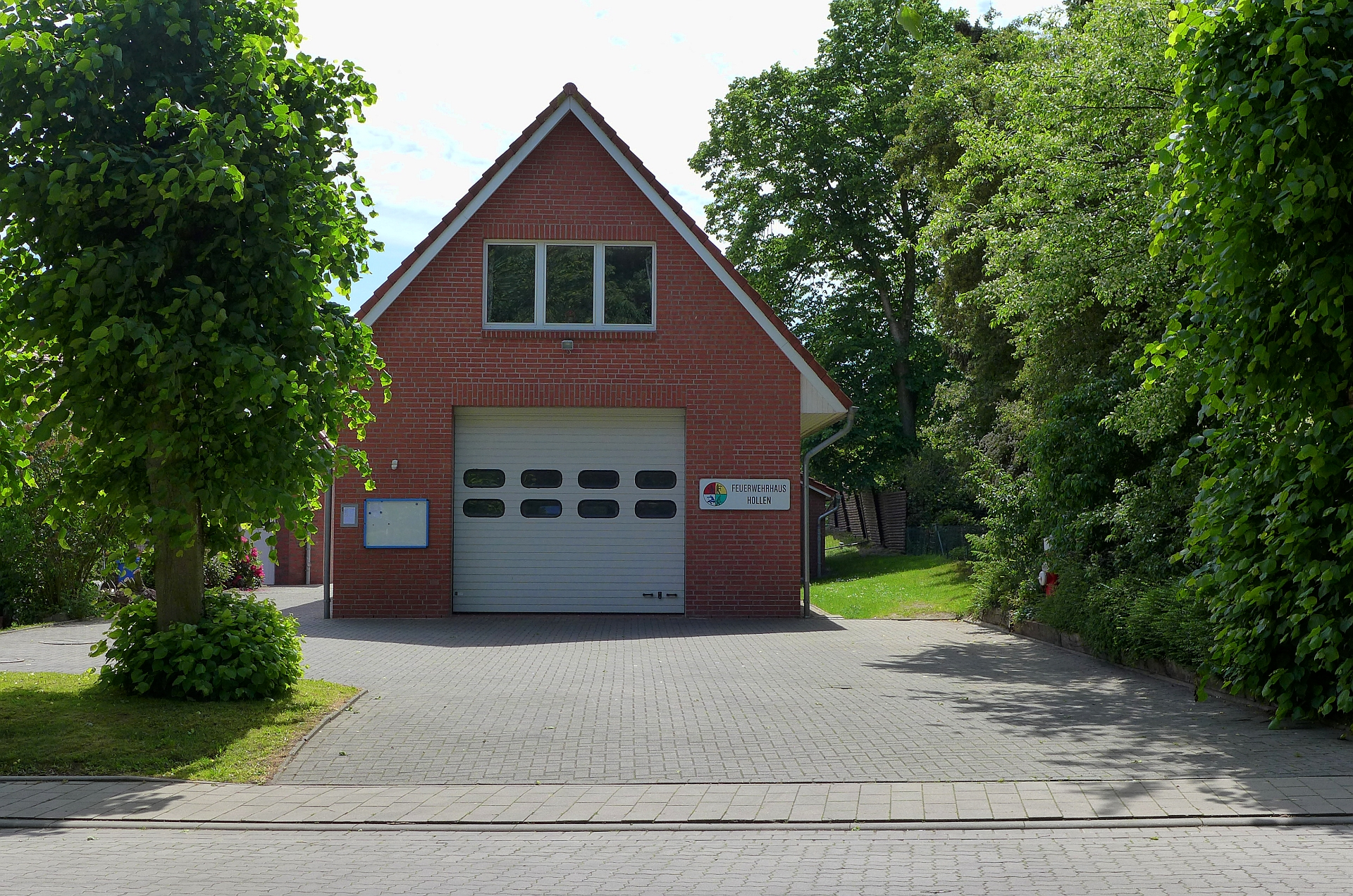 Feuerwehrhaus der Freiwilligen Feuerwehr der Samtgemeinde Börde Lamstedt, Ortsfeuerwehr Hollen.